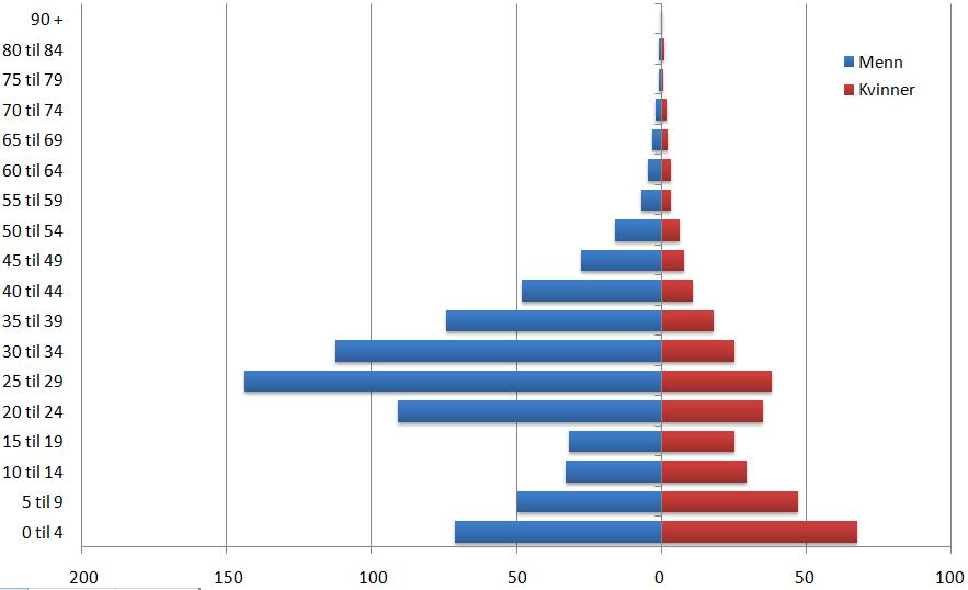 De Forente Arabiske Emiraters befolkningspyramide fra 1980 (per tusen)